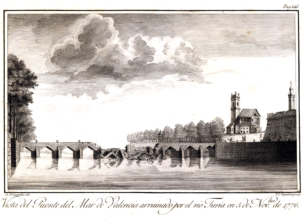 Gravat de Cavanilles i López Enguídanos, sobre el trencament del Pont de la Mar per la riuà de 5 de novembre de 1776, arreplegat en el llibre Observaciones sobre la historia natural geografía, agricultura, población y frutos del reino de Valencia.